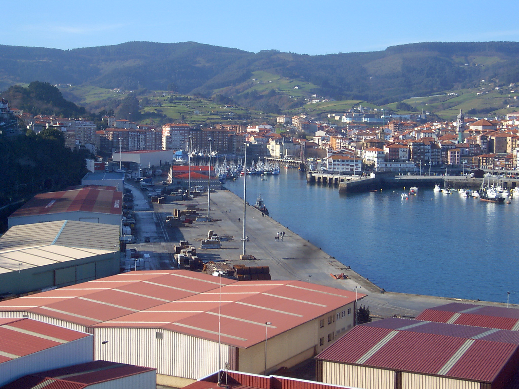 Bermeoko portu komertziala